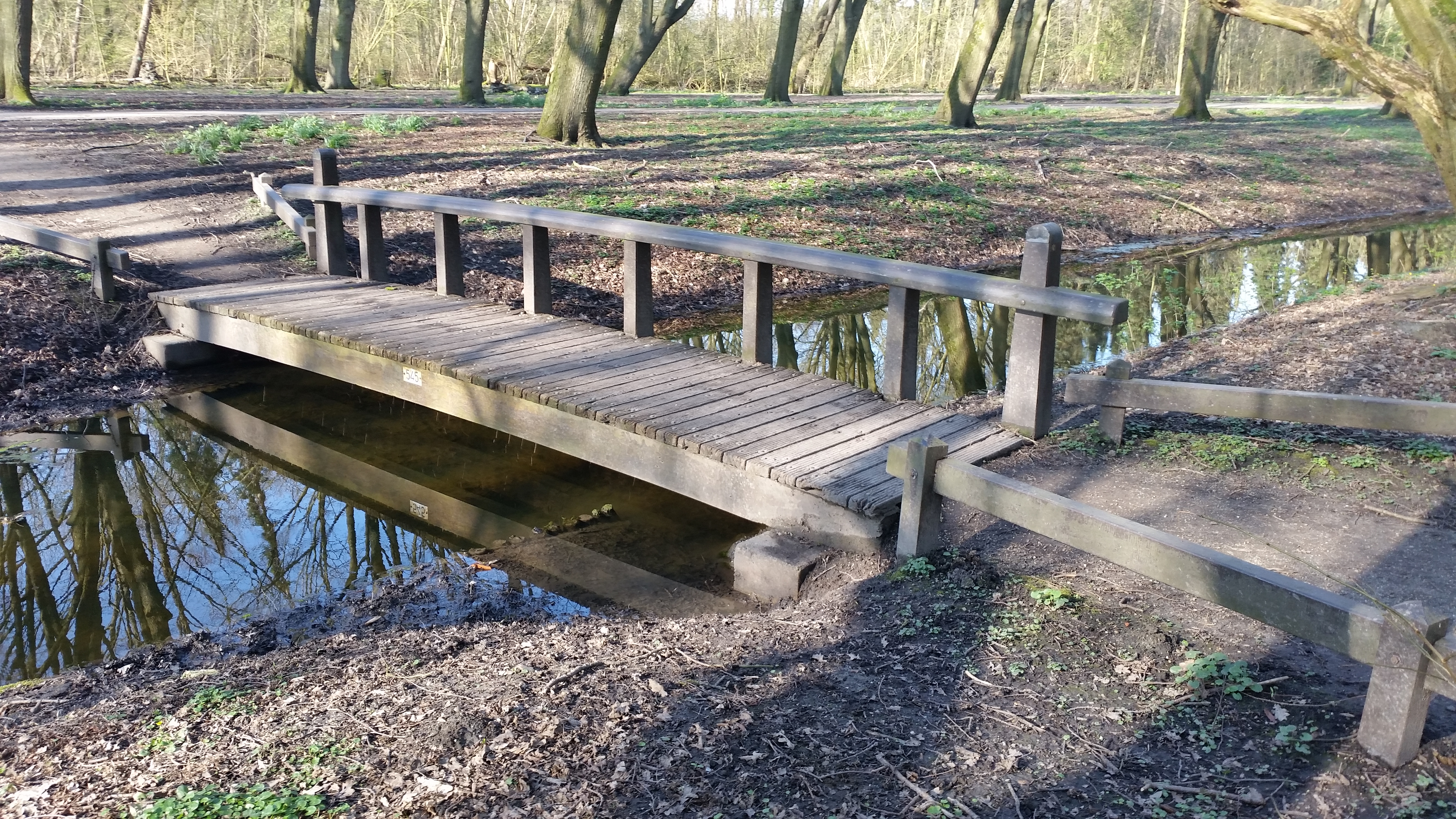 Zijaanzicht van Brug 545 (in Amsterdam)